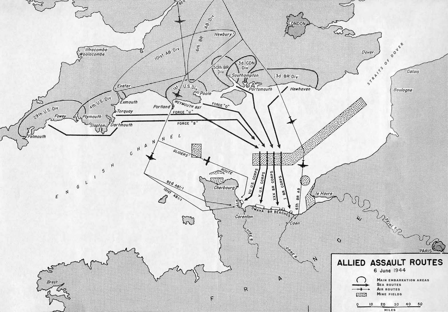 Plan d'attaque du débarquement en Normandie From Center for Military History, US Army ( Originally prepared as part of the US Military History: Utah Beach To Cherbourg